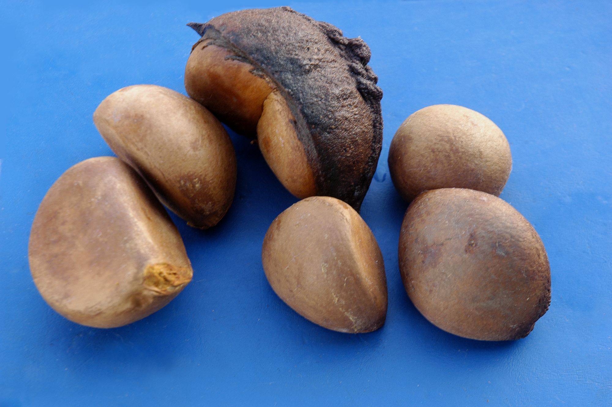 Andiroba (Carapa guianensis Aubl.), sementes